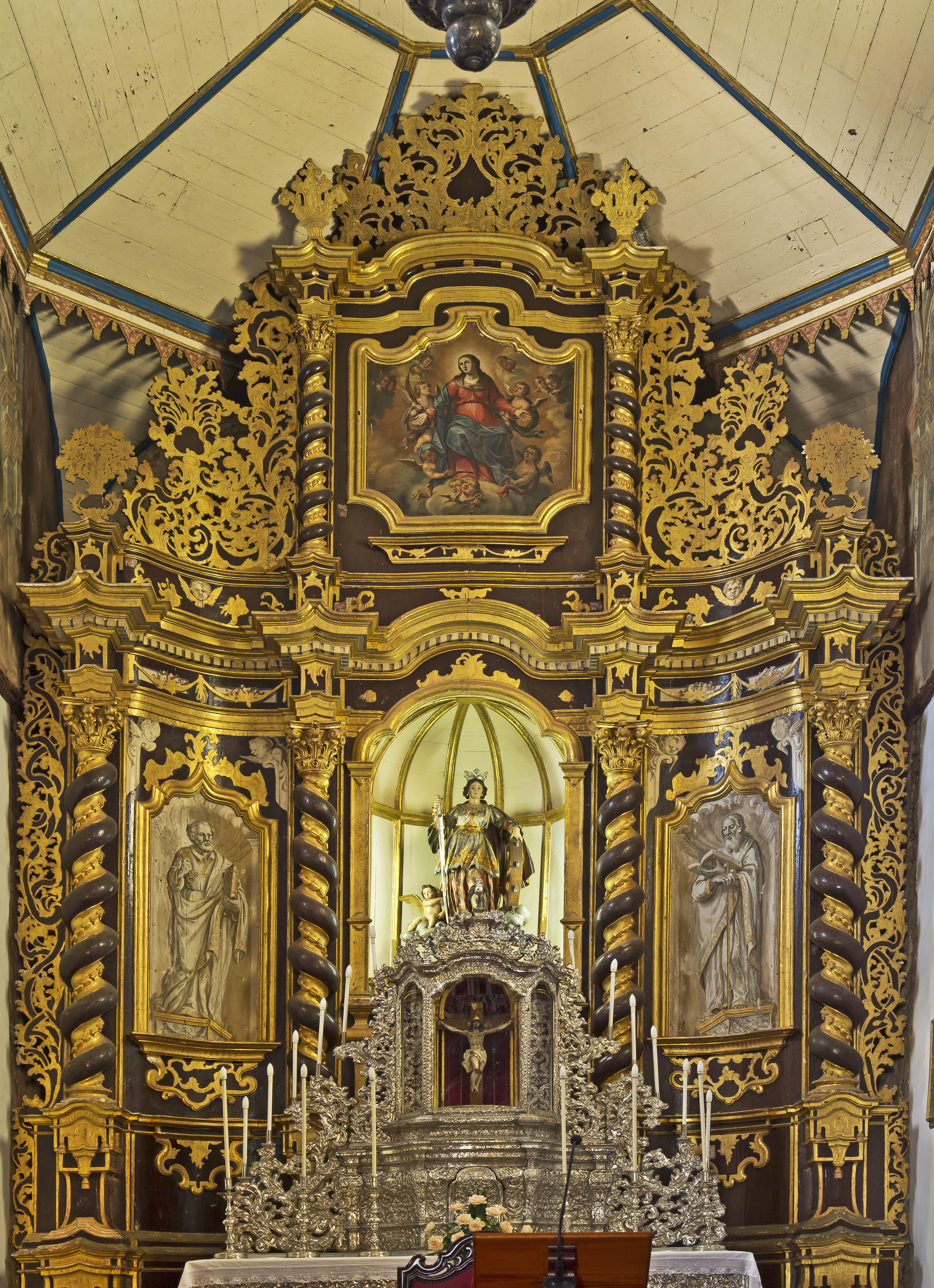 Hauptaltar der Kirche Santa Catalina in Tacoronte